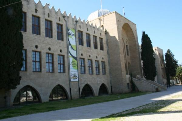 חזית בניין הטכניון הישן